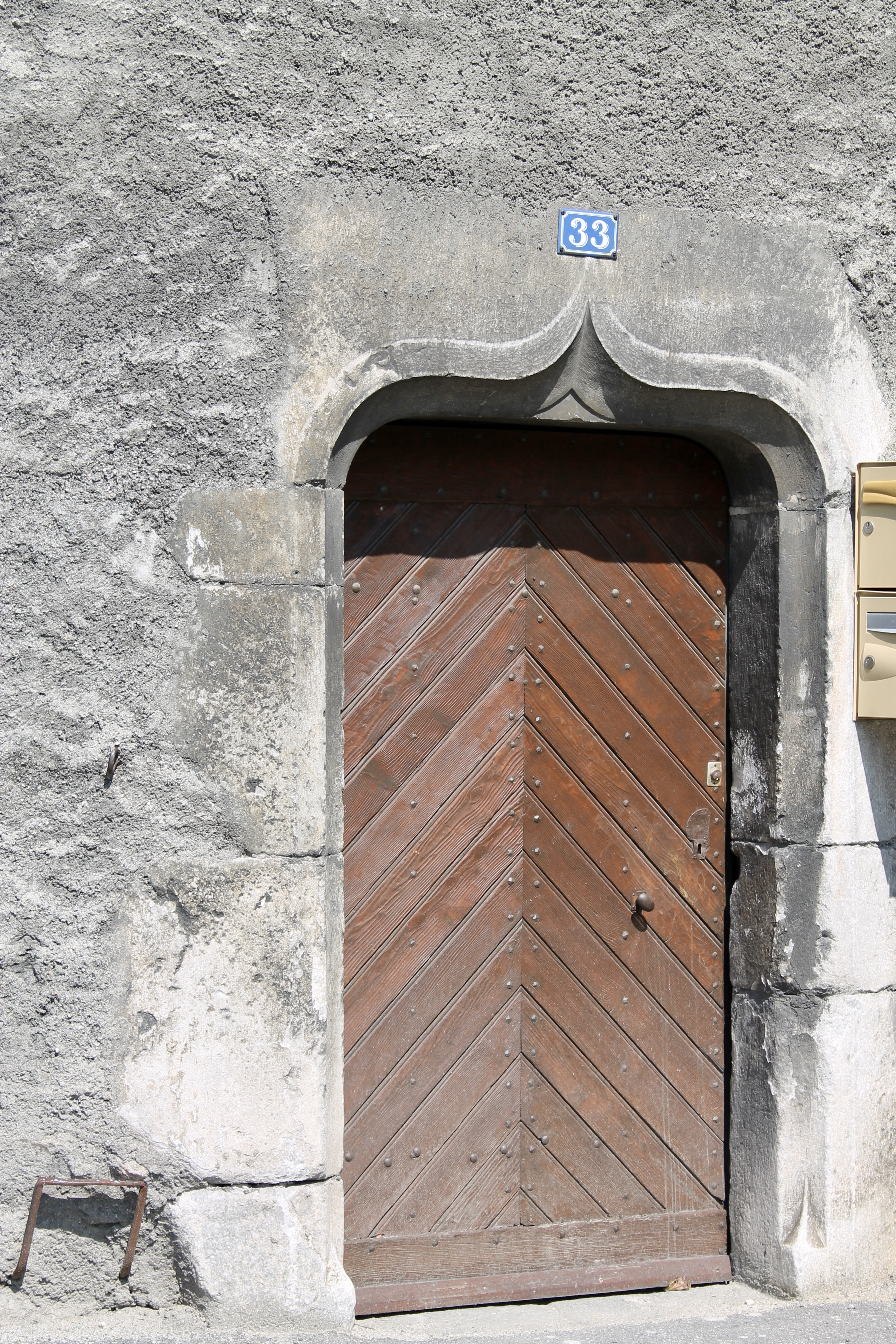 Porte de la maison fort d'Aigueblanche (été 2018).